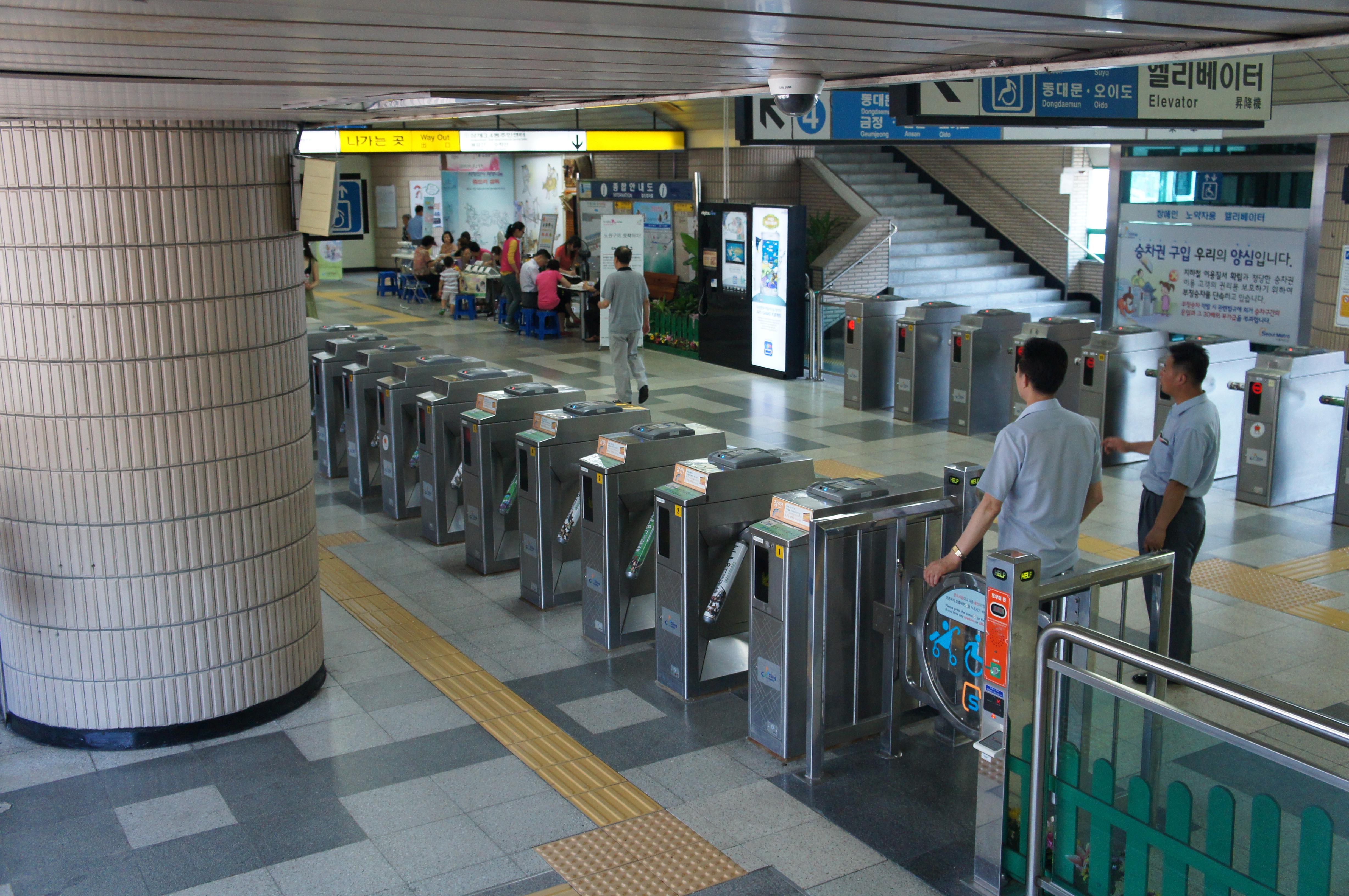 당고개역 대합실